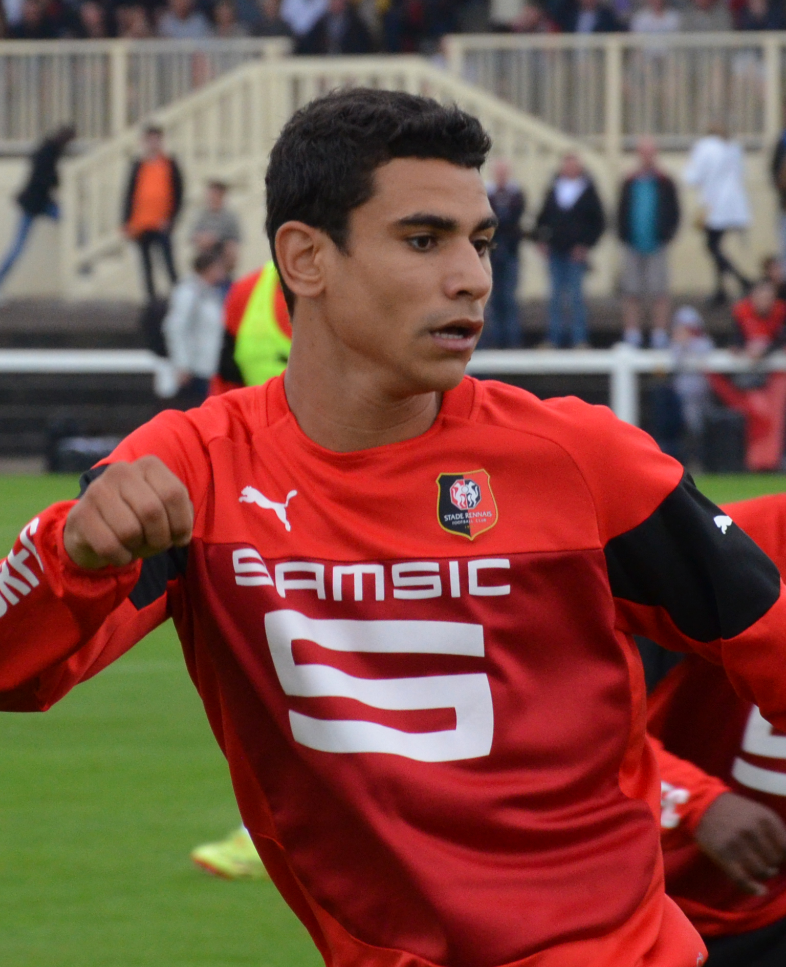 Photo prise lors de l'échauffement des joueurs du Stade rennais avant un match amical face à l'US Orléans au stade Paul-Audrin de Dinard. Ici, Benjamin André.